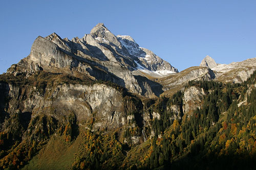 Ortstock und Höchturm, von Braunwald aus gesehen